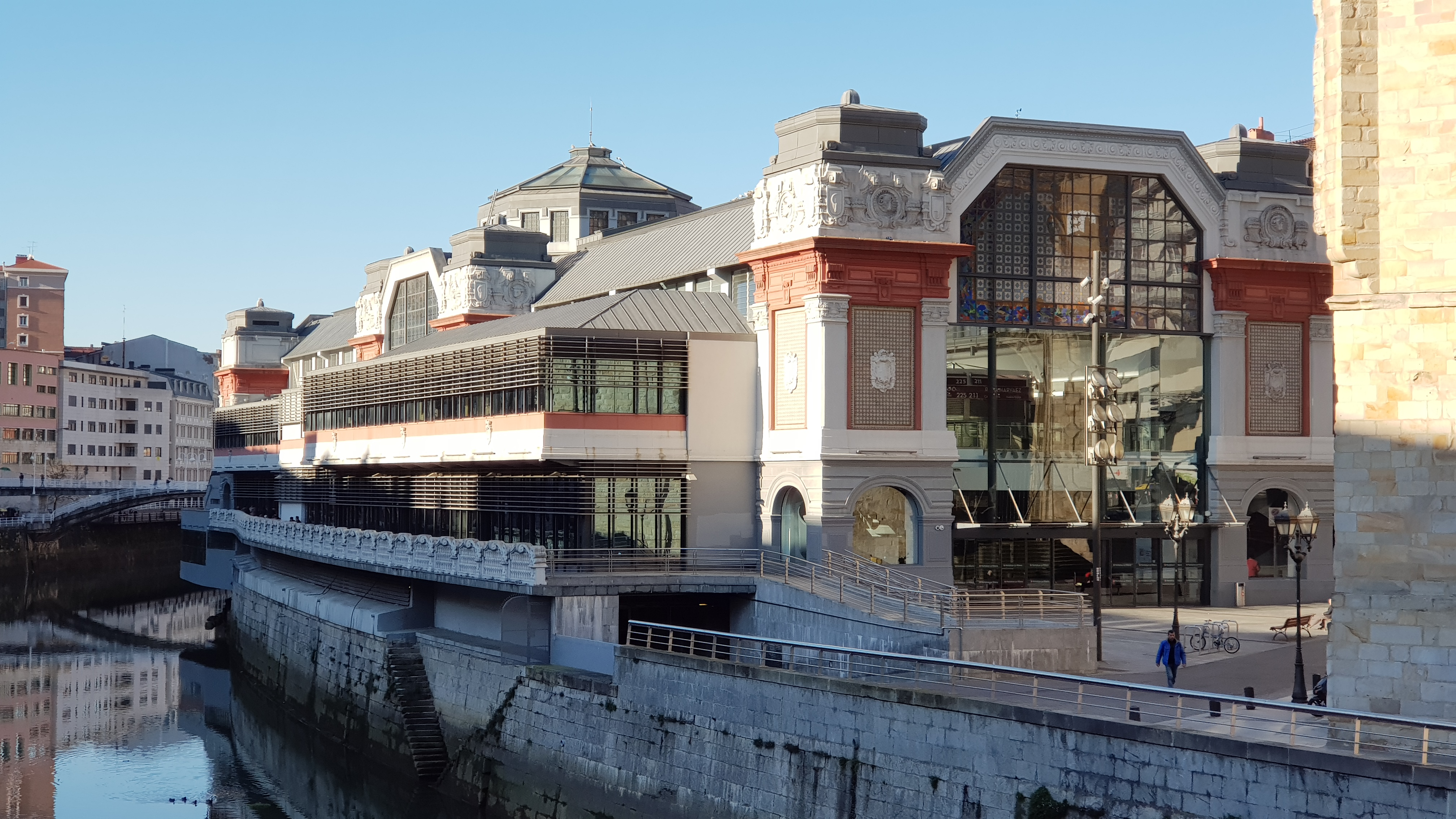 Mercado de La Ribera, Bilbao